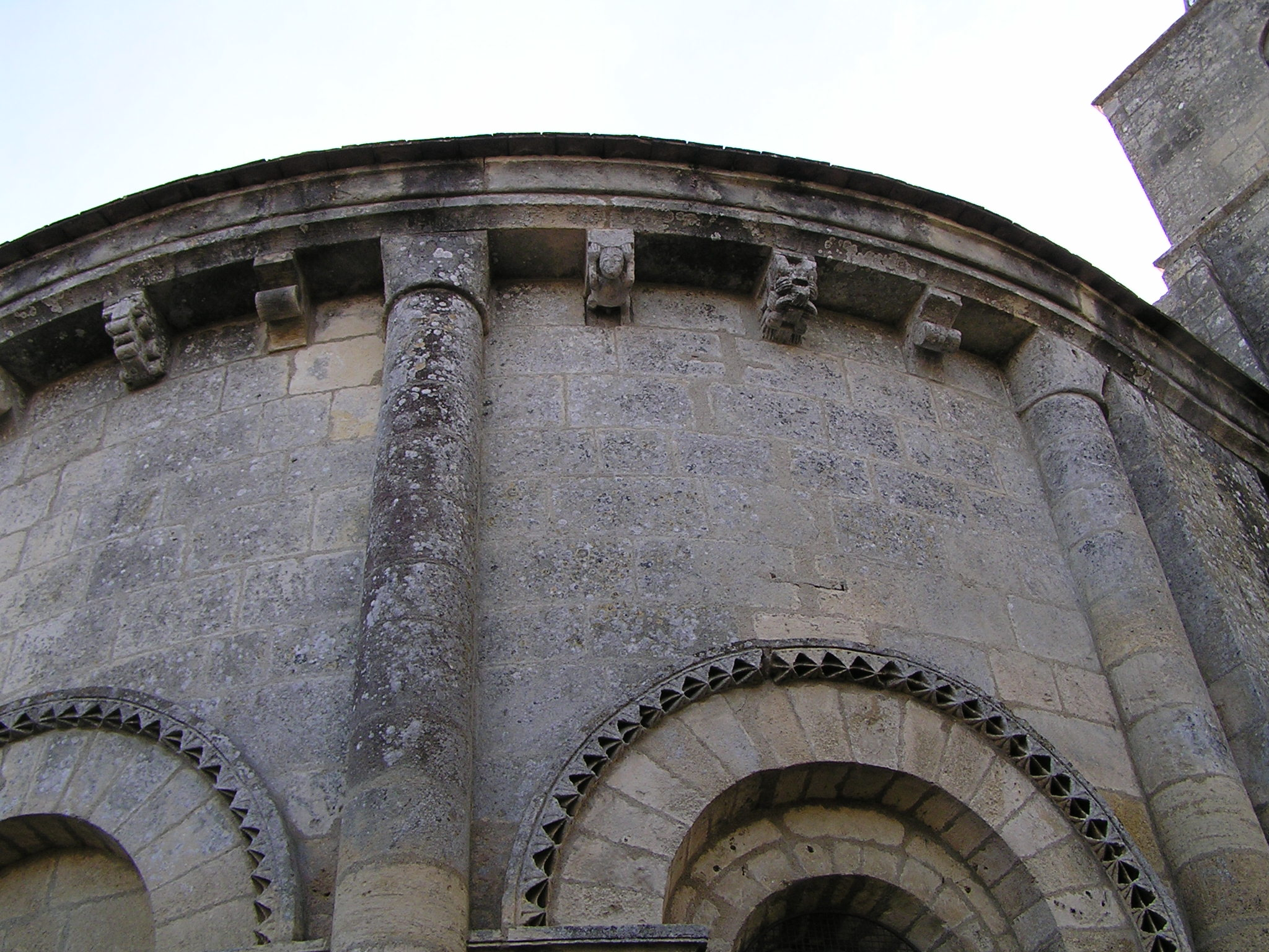 église Saint-Vivien de Cherves-Richemont